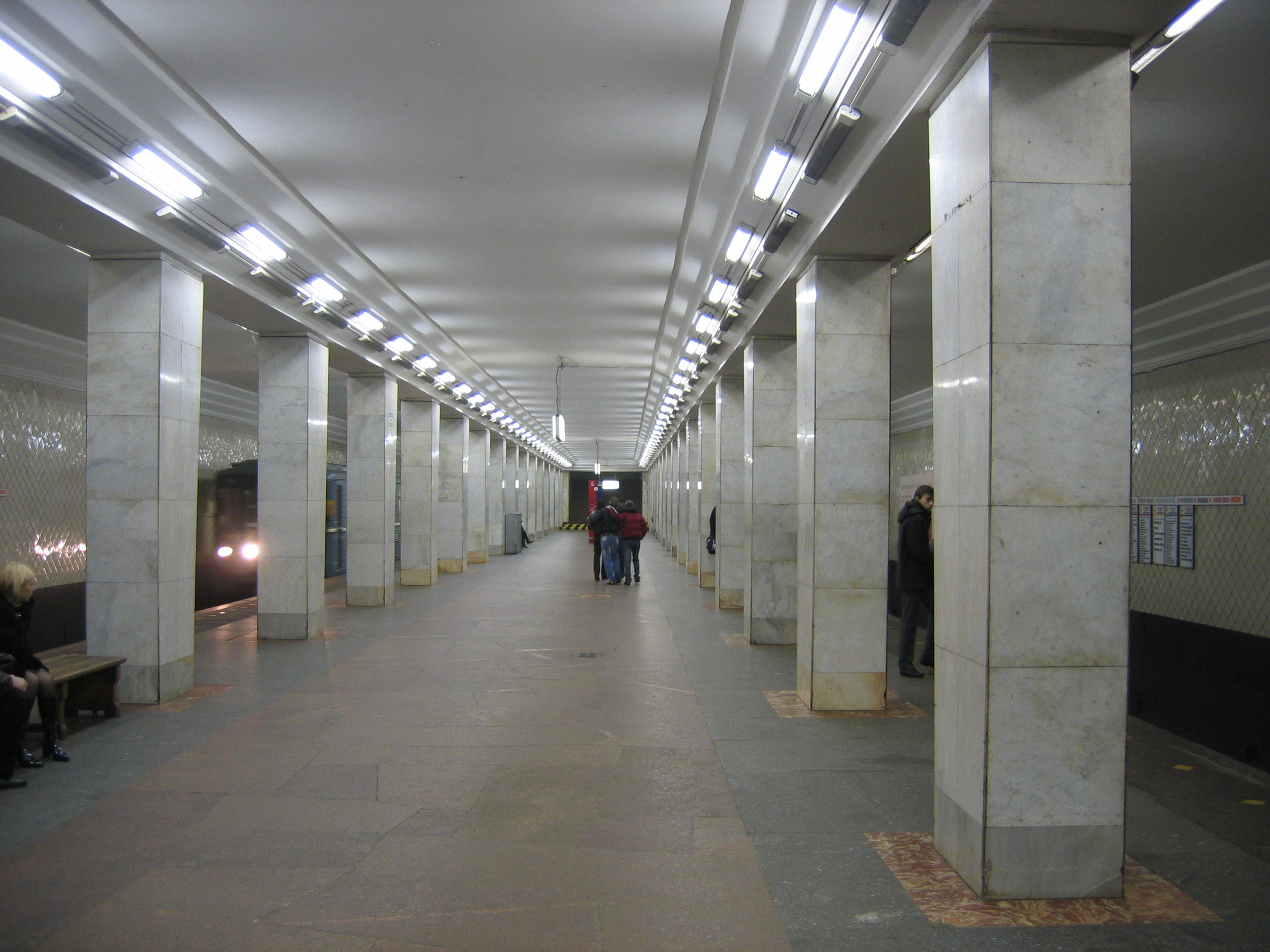 Московский метрополитен. Станция Ленинский проспект